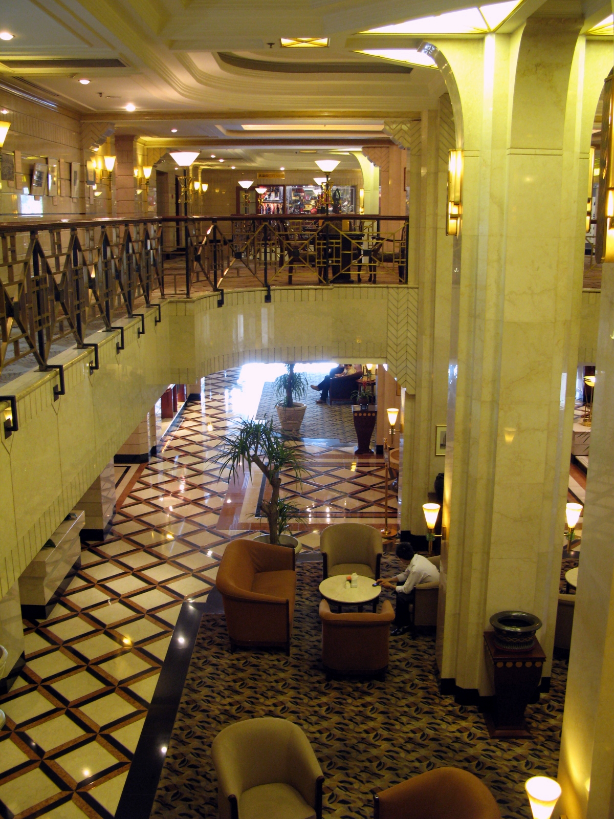 上海国际饭店 Shanghai Park Hotel Interior